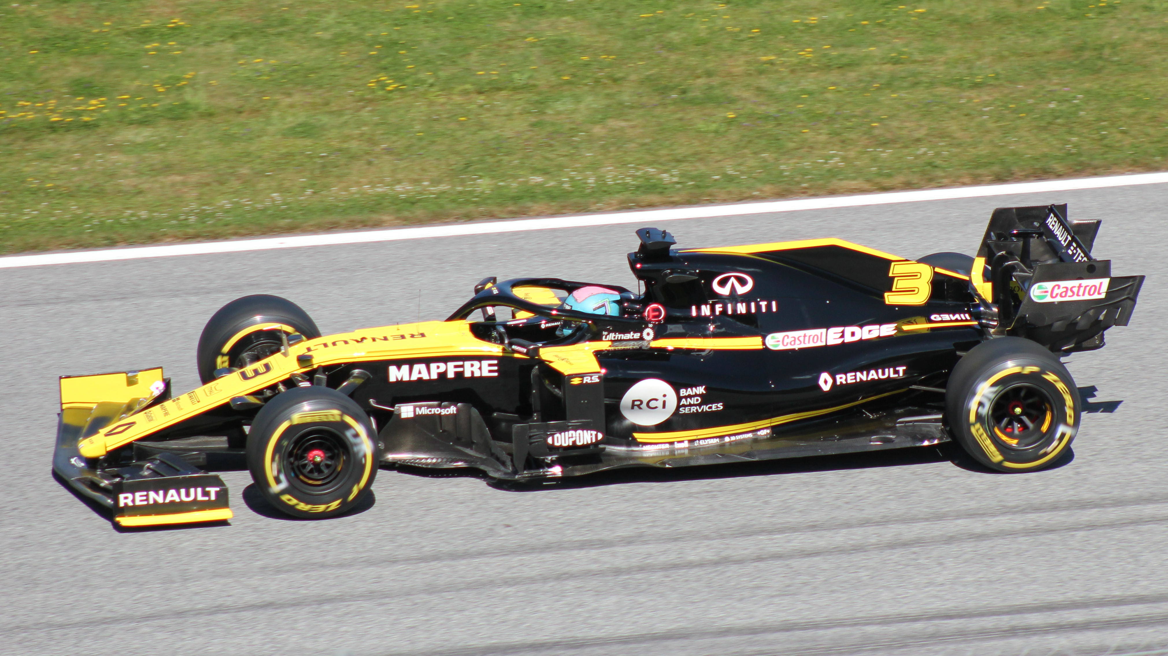 Ricciardo beim Rennwochenende in Österreich 2019